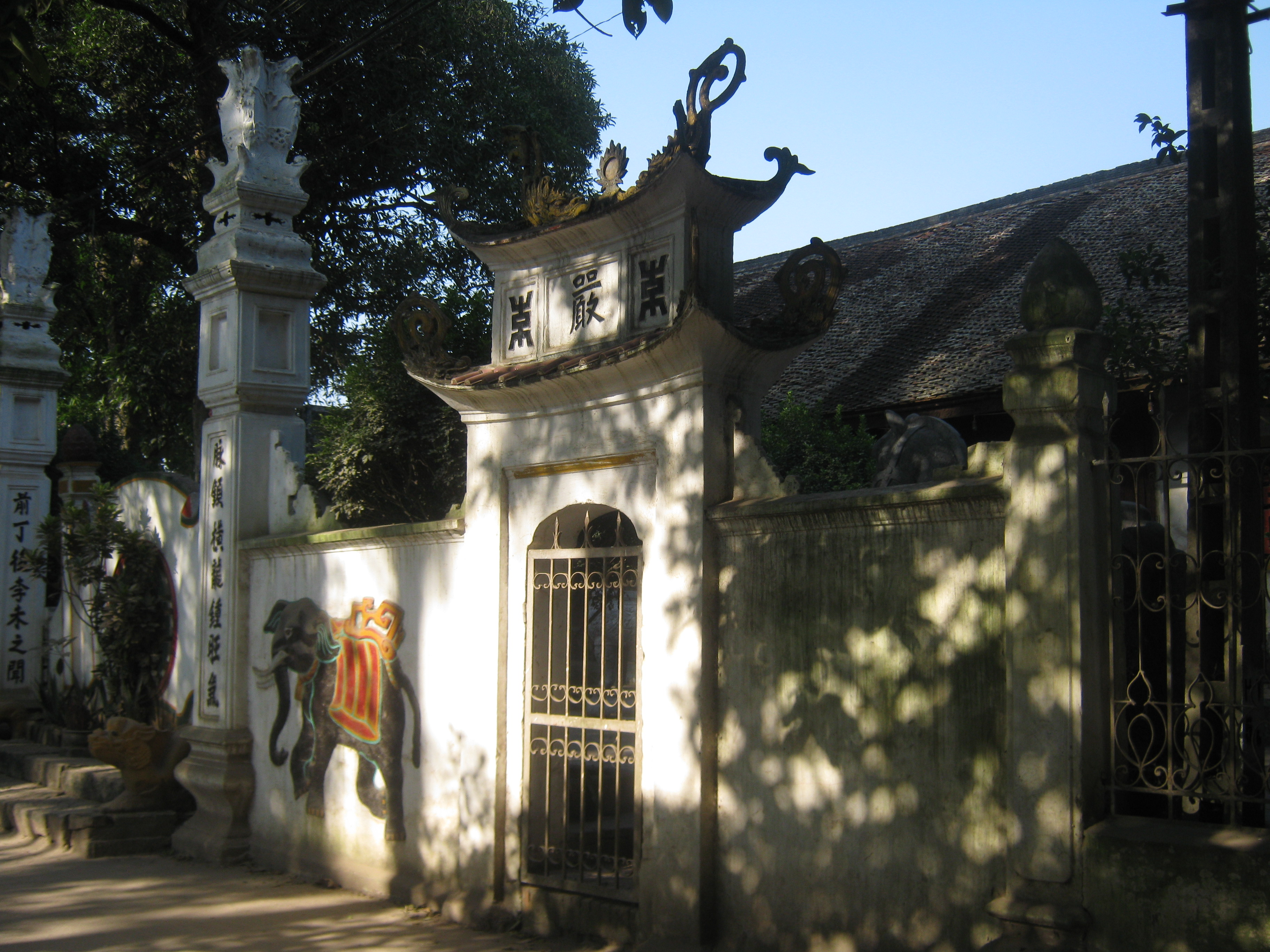 Đình Phú Diễn - xã Hữu Hòa, Thanh Trì, Hà Nội. Nơi thờ Vua Lê Đại Hành gắn với truyền thuyết vua đi đánh Tống dừng chân và săn bắn trong rừng.